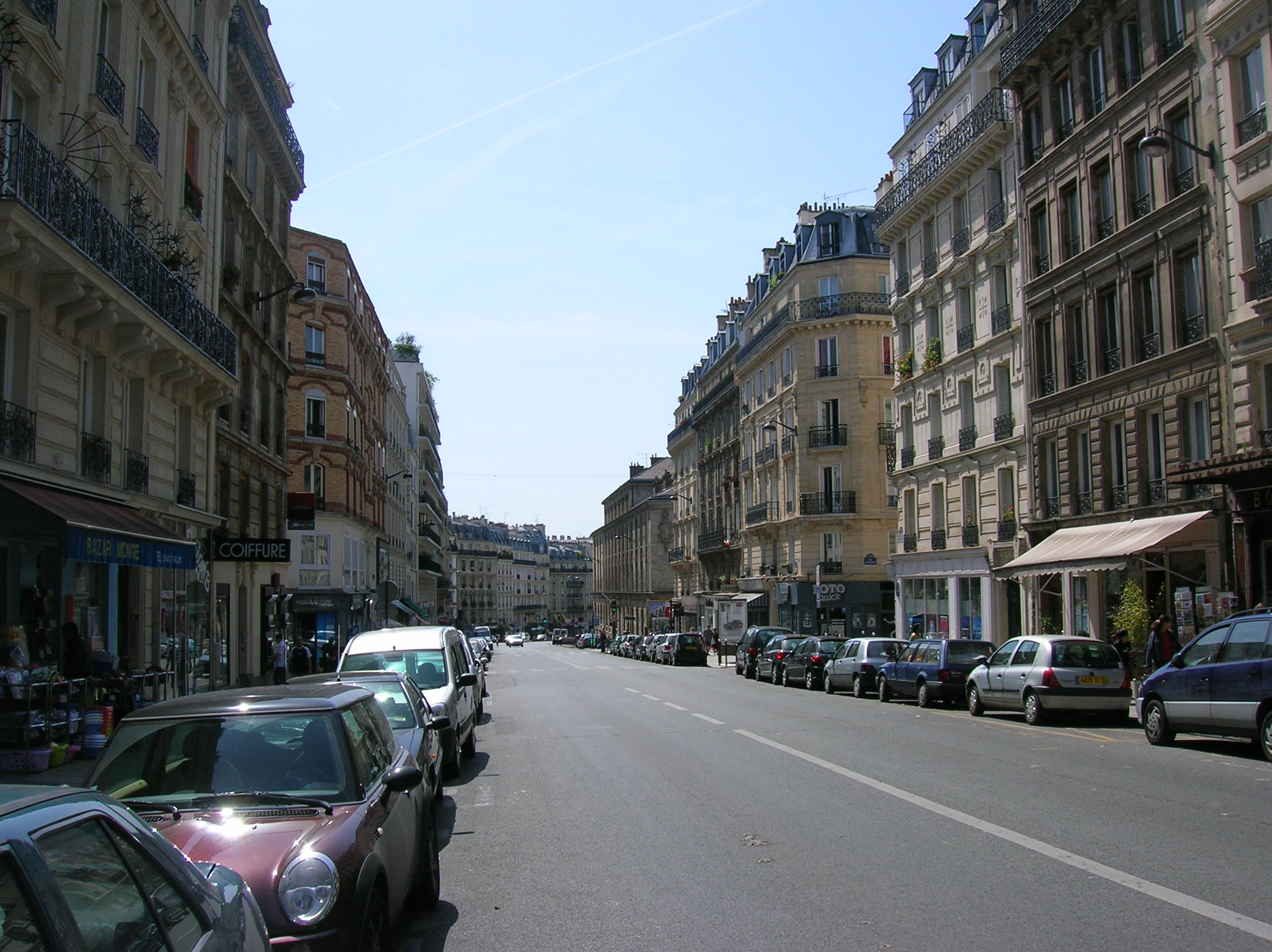 La rue Monge à Paris, en direction du sud